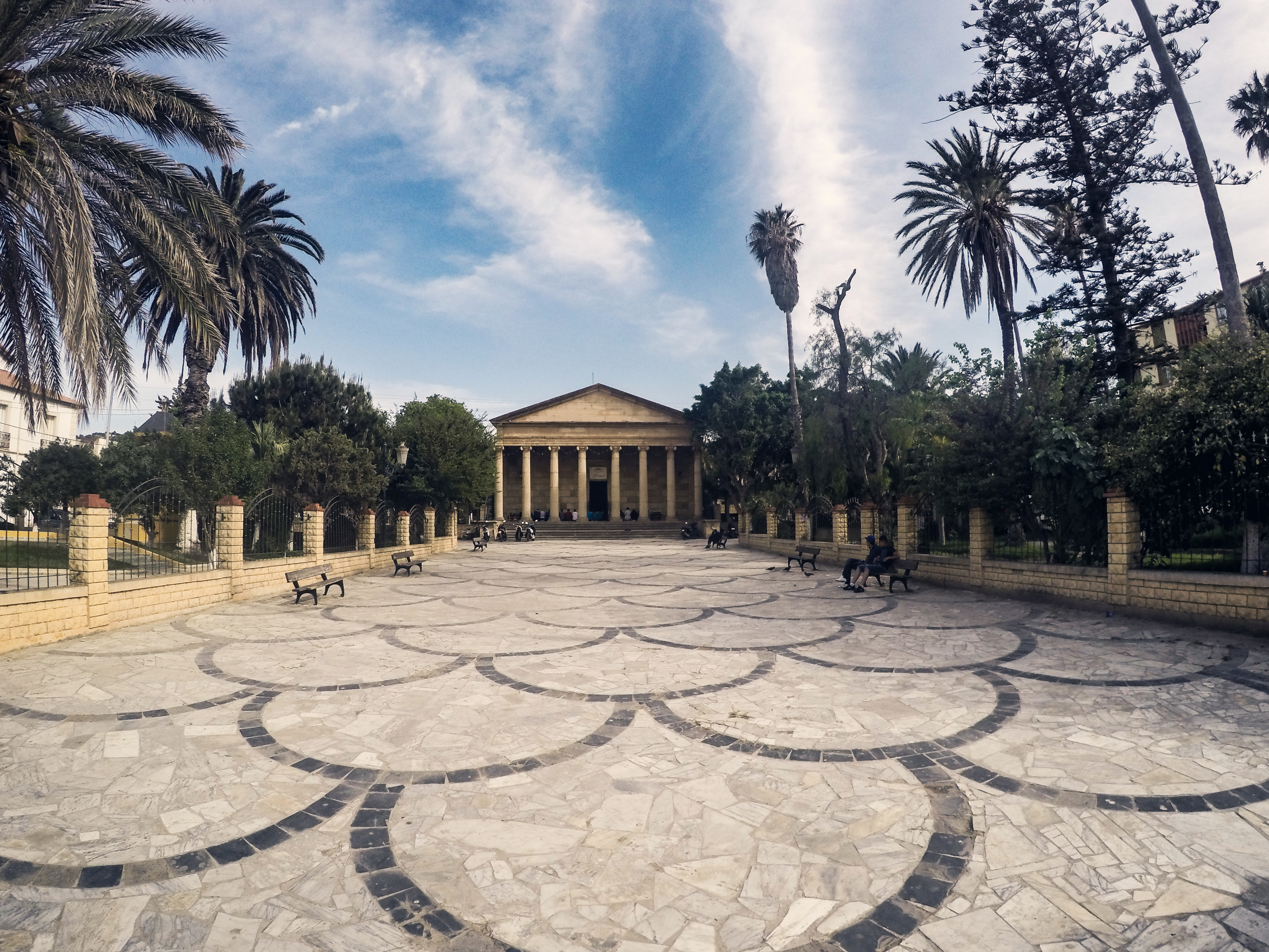 Mosquée Ennour de Cherchel, Construite sur les ruines d’un temple romain, la mosquée aux cent colonnes couve des vestiges d’une immense richesse architecturale, dont une partie à été mise au jour lors des fouilles pratiquées en 1861 dans sa cour. Cette découverte a été à l’origine de la légende de l’existence d’un cheval ailé en or grandeur nature qui serait encore sous les soubassements de la mosquée.